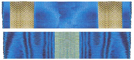 Lint 1881 - 1932 en 1932 - 1947